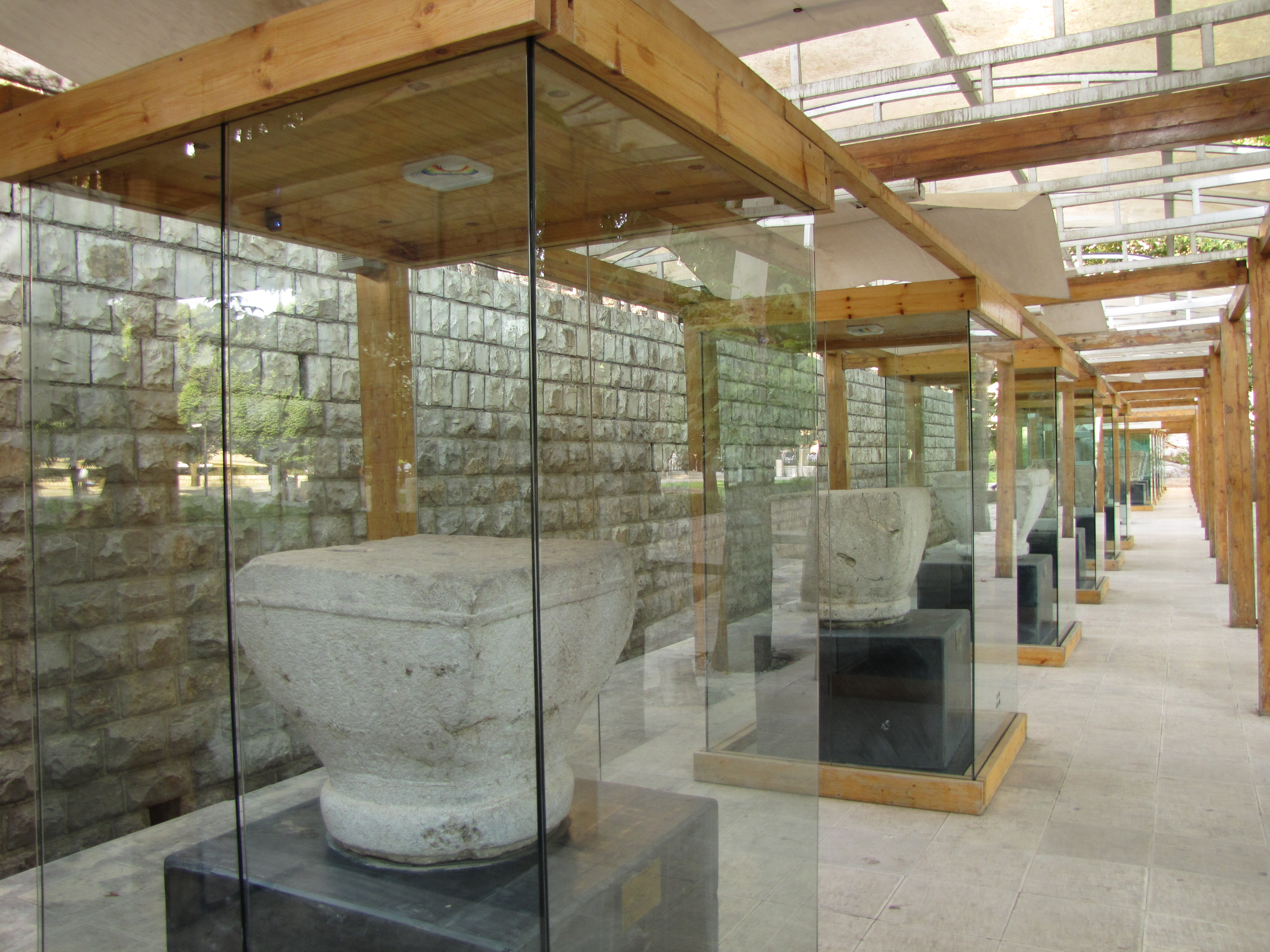 Tagh-e-Bostan Rock Museum